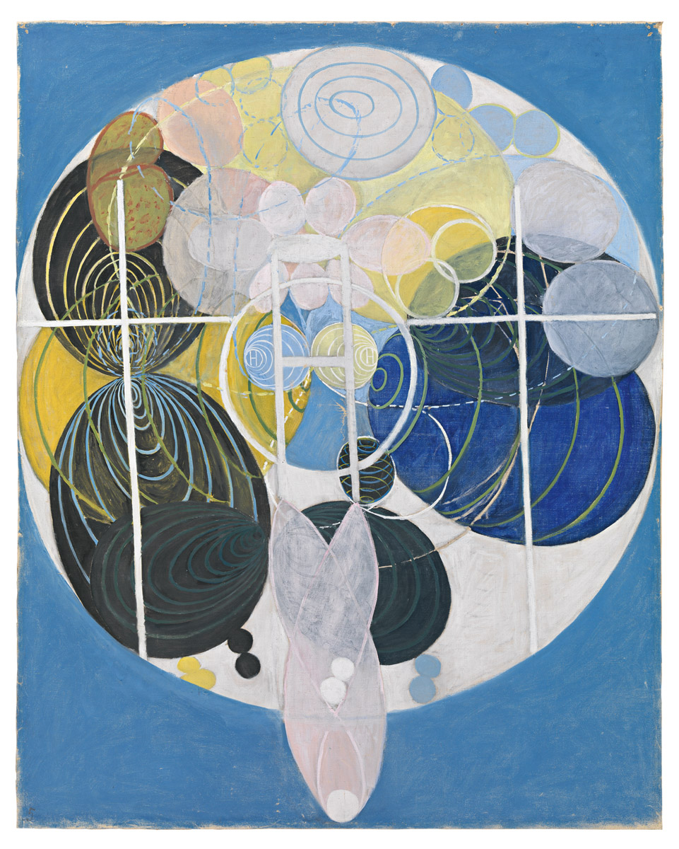 Grupp III, nr 5. De storafigurmålningarna, Nyckeln tillhittillsvarande arbete, 1907Olja på duk150 × 118 cmHAK042© Stiftelsen Hilma af Klints Verk